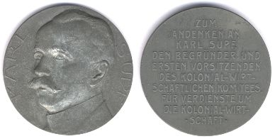 Karl Surf Medaille